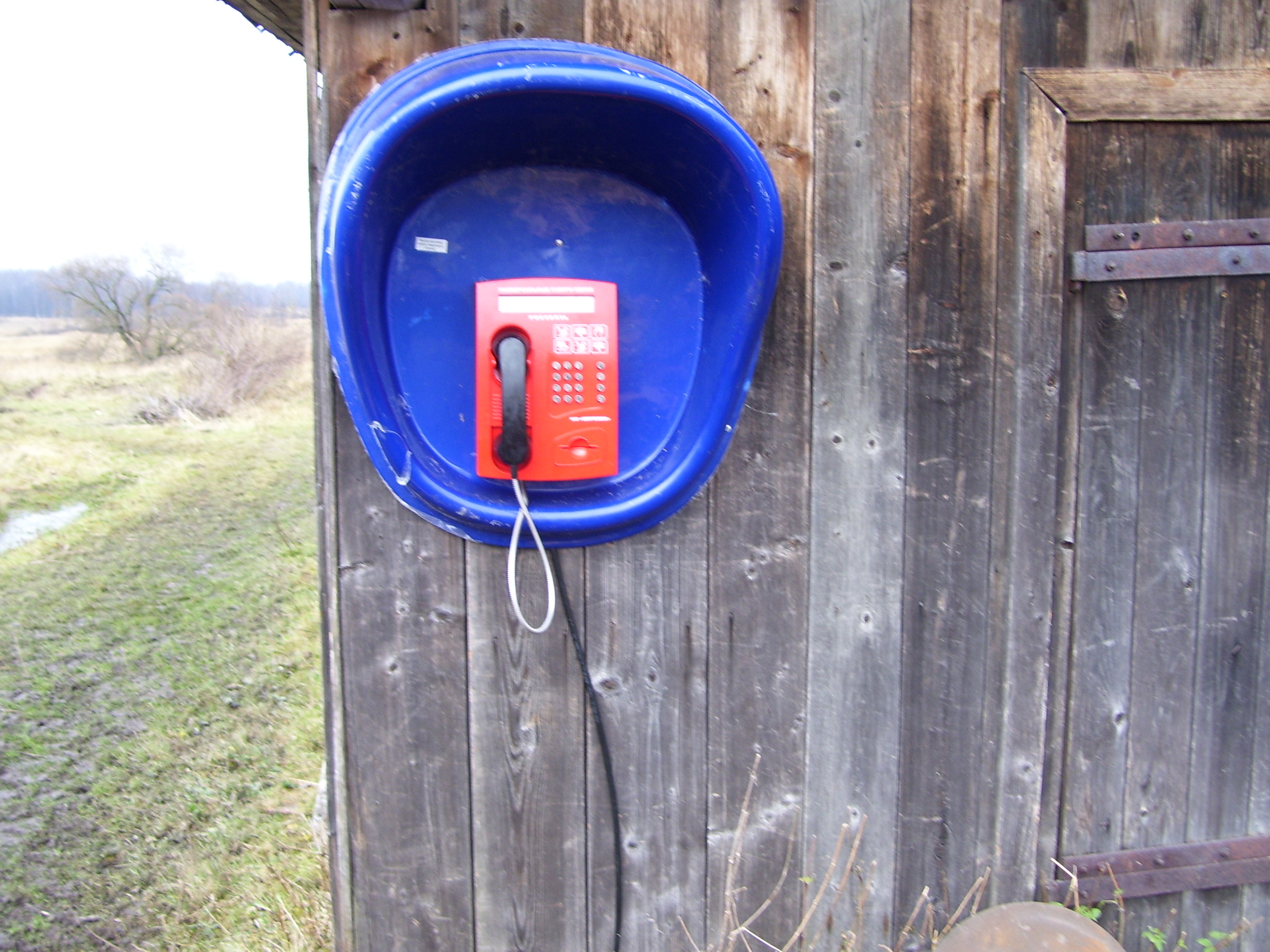 Телефон был установлена на хозяйственной постройке последнего жителя деревни Дятловщина Смоленской области, ветерана ВОВ - Соболева Егора Васильевича